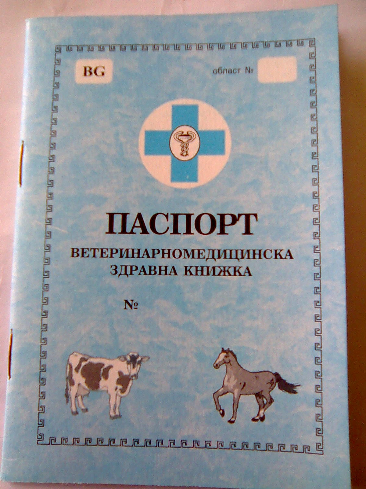 Образец на паспорт за ЕПЖ стар образец